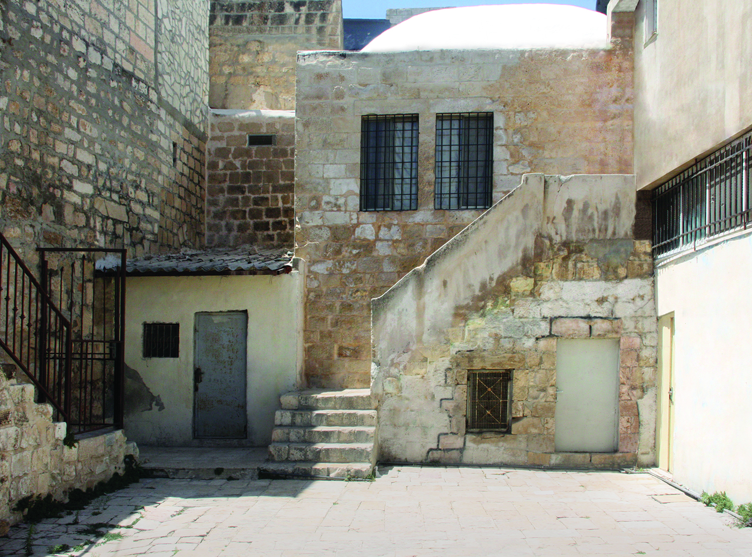 Jerusalem